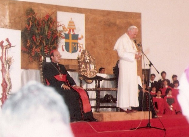 Juan Pablo II en el Seminario Mayor de Medellín el 5 de julio de 1986, Colombia.